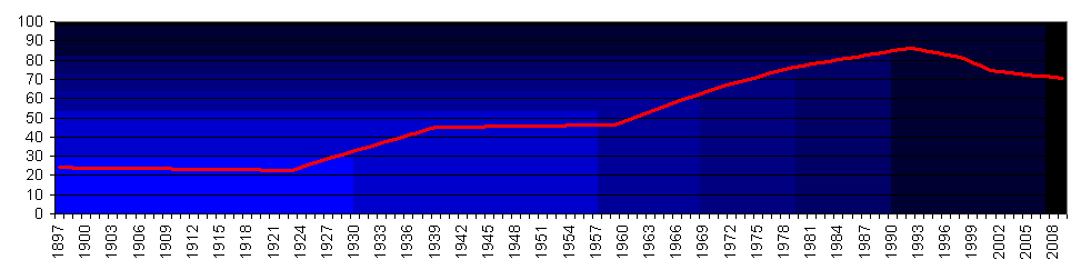 График численности населения Феодосии, согласно переписи населения 2001 года